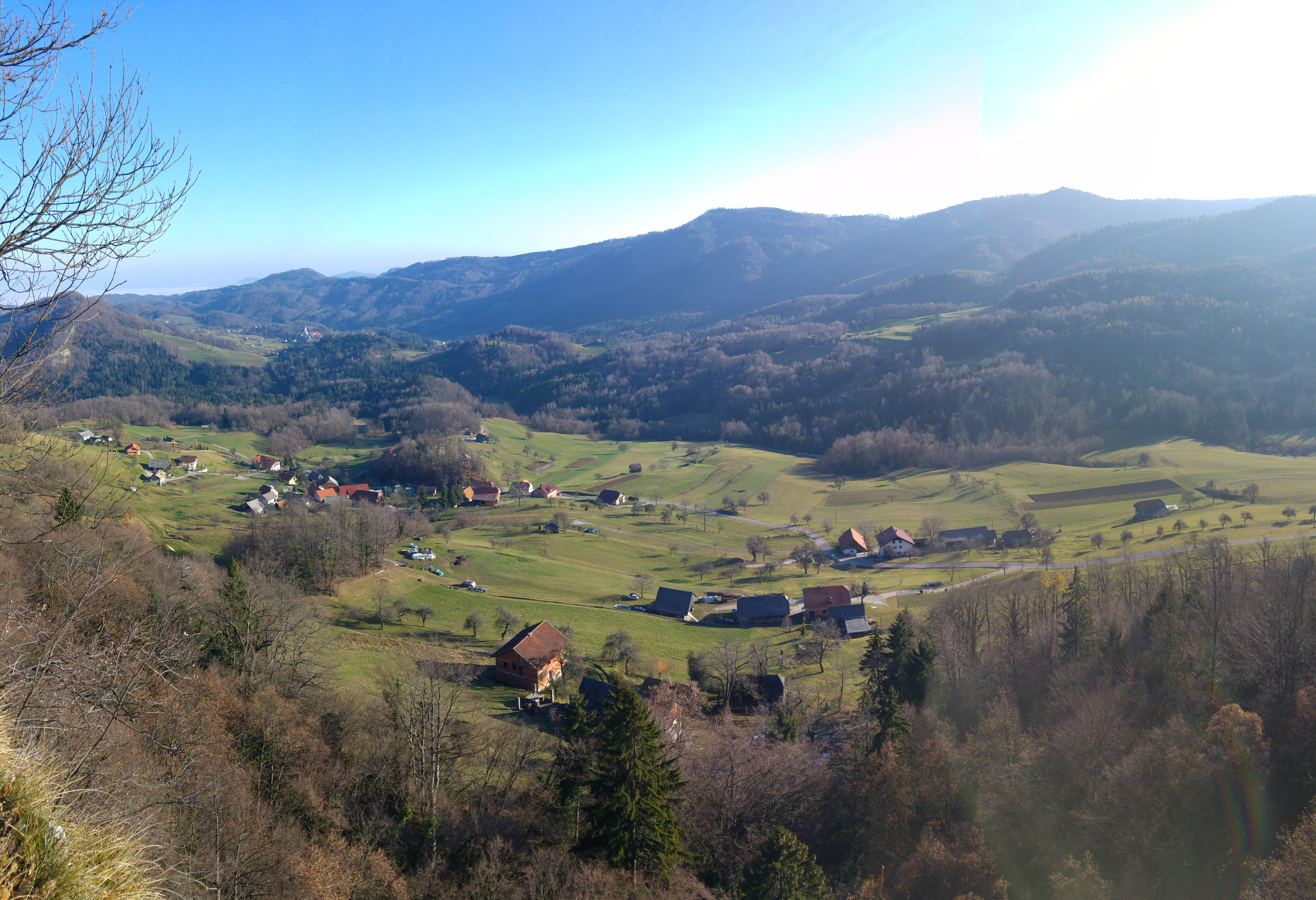 Podpeč pri Šentvidu